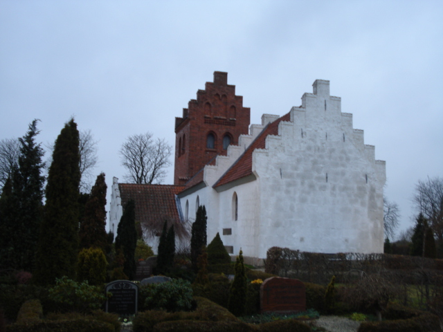 Ørting Kirke, Oerting Church, Jutland, Denmark